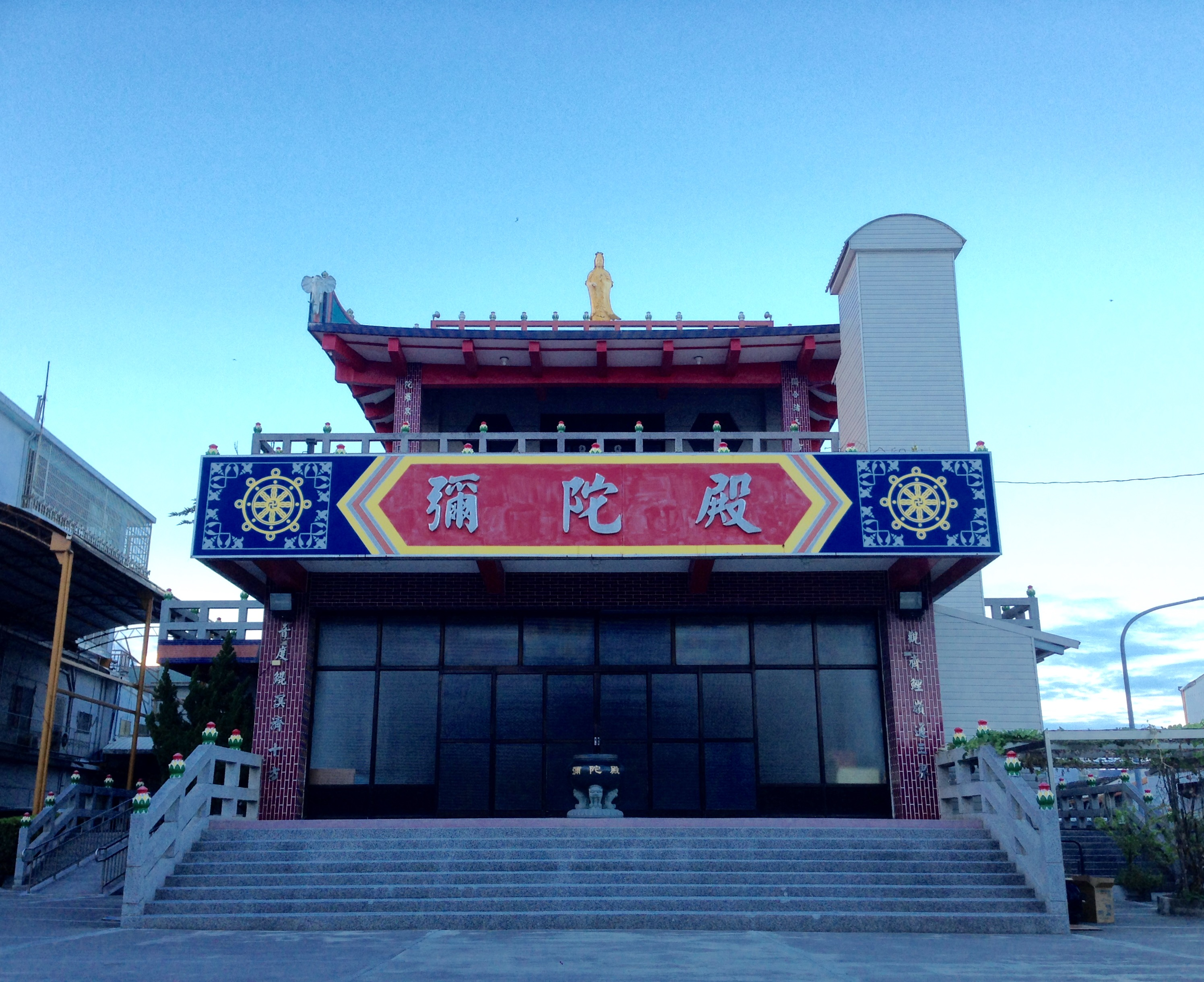 中文（台灣）: 海山寺彌陀殿